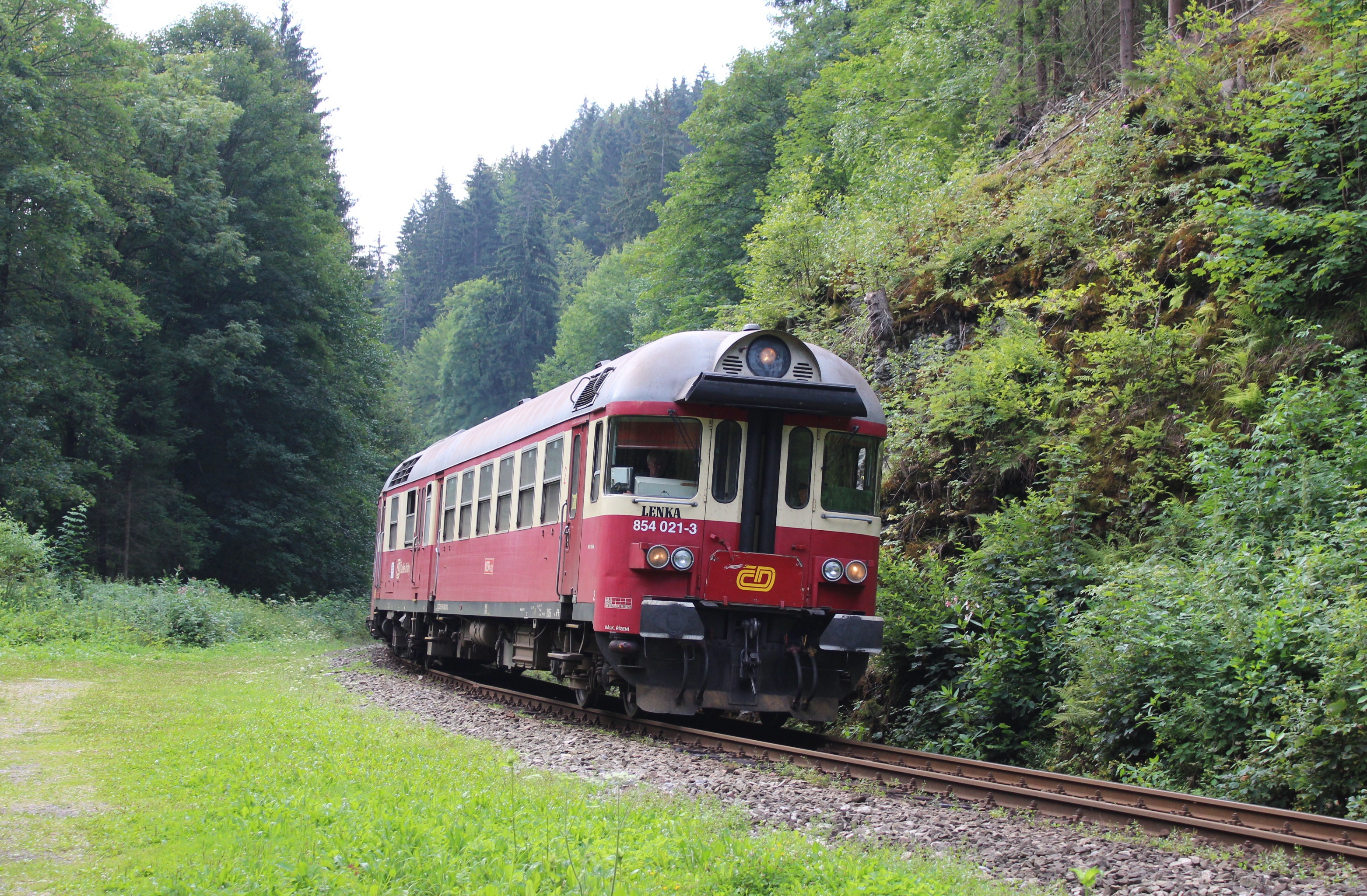 Motorový vůz 854.021-3 "Lenka" za zastávkou Návarov